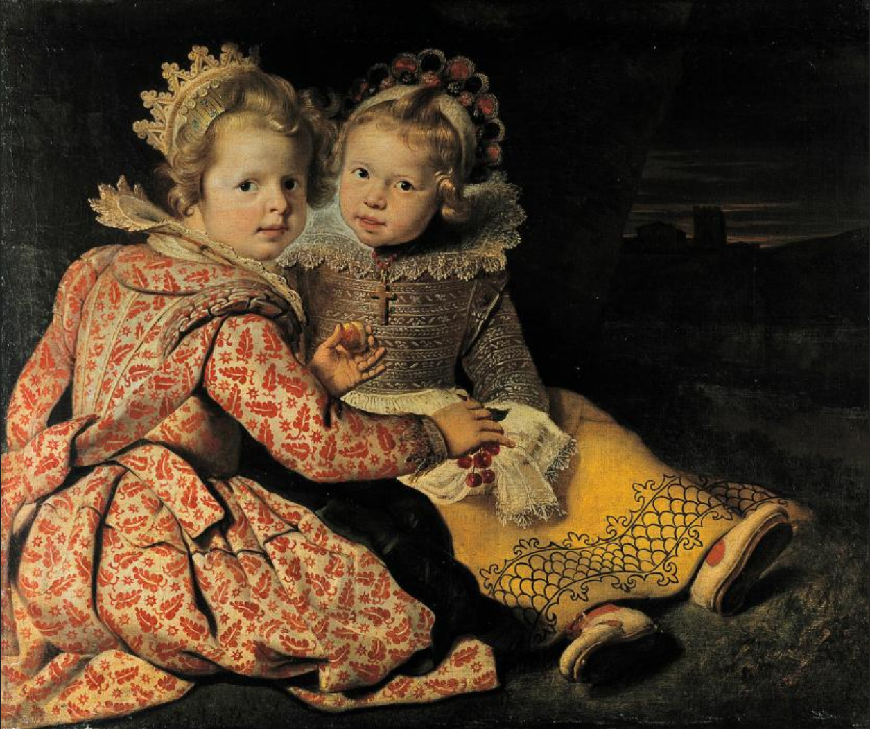 Magdalene (geb. 1618) und Jan Baptist (geb. 1619), die Kinder des Malers